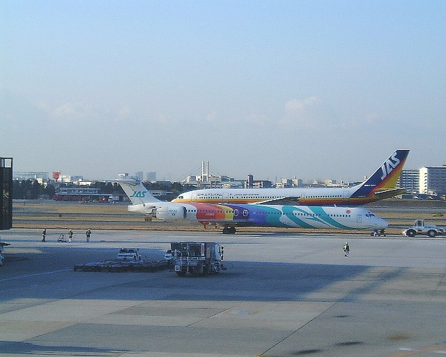 滑走路上ですれ違うja:日本エアシステム機 大阪国際空港にて